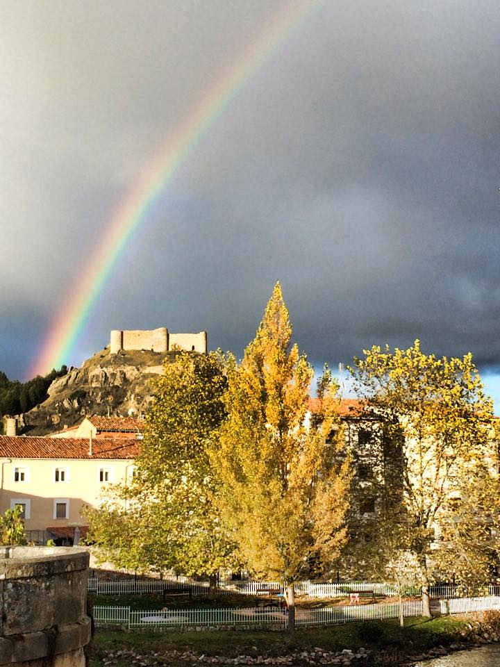 Vista parcial del Castillo de Aguilar de Campoo - po Andrea Gama